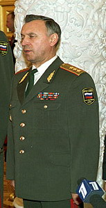 Николай Егорович Макаров